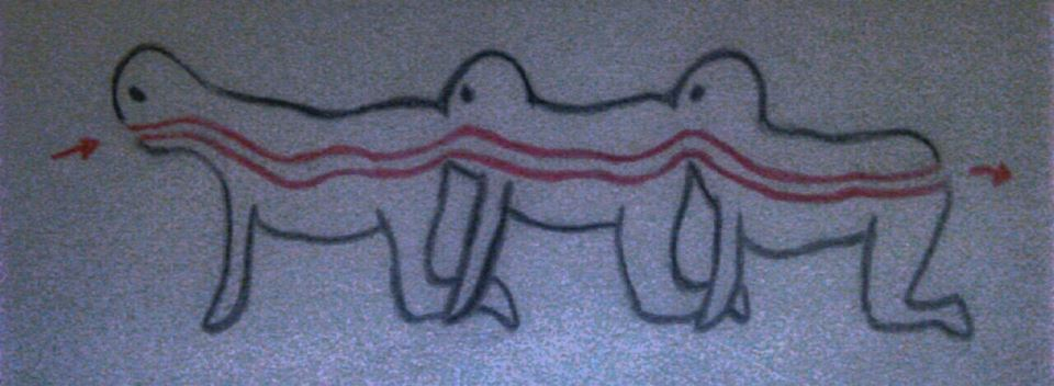 Dibujo basado en el arte de The Human Centipede. Filminas como esta son presentadas en la pelicula The Human Centipede y aparecen en The Human Centipede 2 y 3 para explicar la operación grotesca que involucra el corte del Ligamentum Petalia y la fusión de la boca y ano de las victimas.